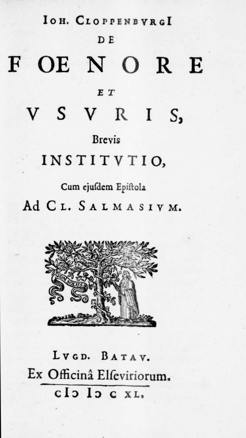 pagina 1